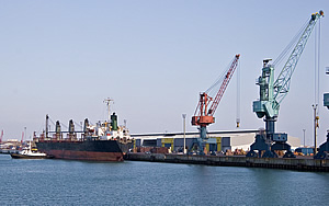 La Pallice - quai de Chef de Baie Photo issue de ma banque d'images personnelle : Pep.per